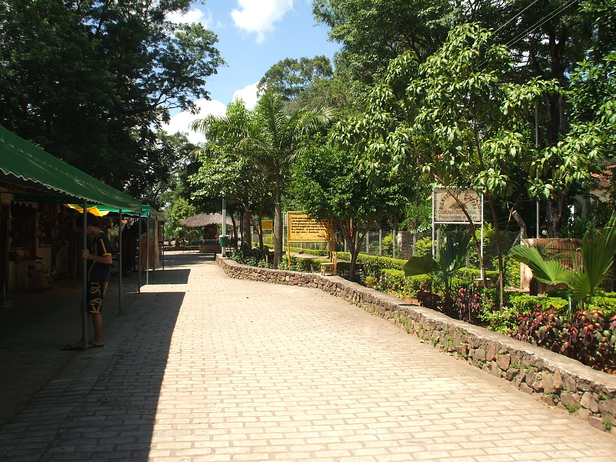 Plaza de Exposicion